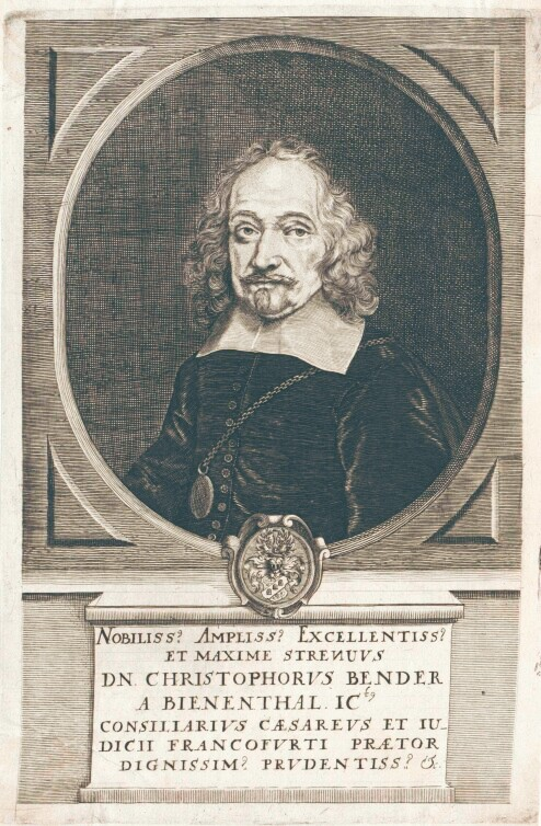 Christoph Bender, seit 1661 Bender von Bienenthal (1603–1666), Frankfurter Ratsherr, Bürgermeister, Schöff und Stadtschultheiß